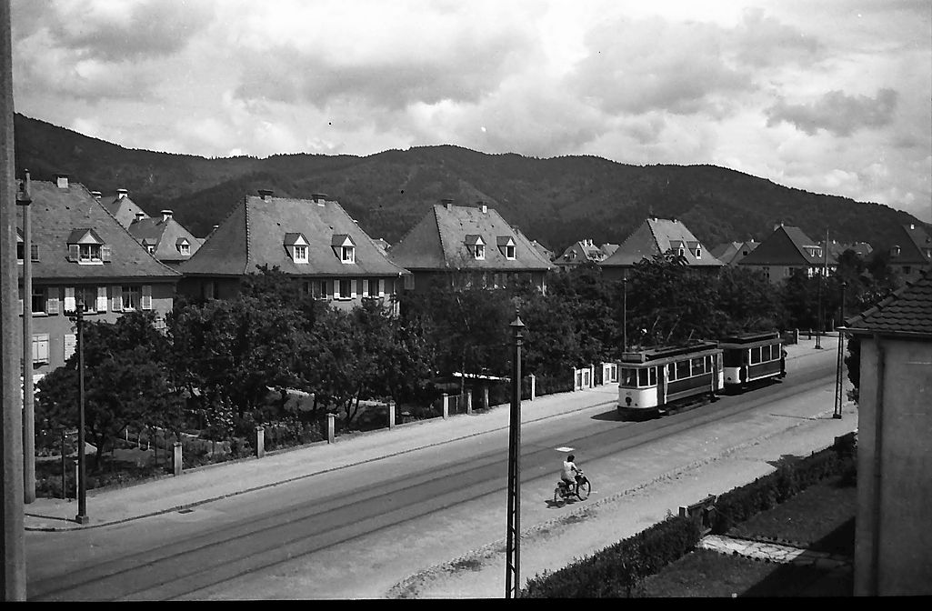 Freiburg i. Br.: Siedlung Hansjakobstraße mit Straßenbahn